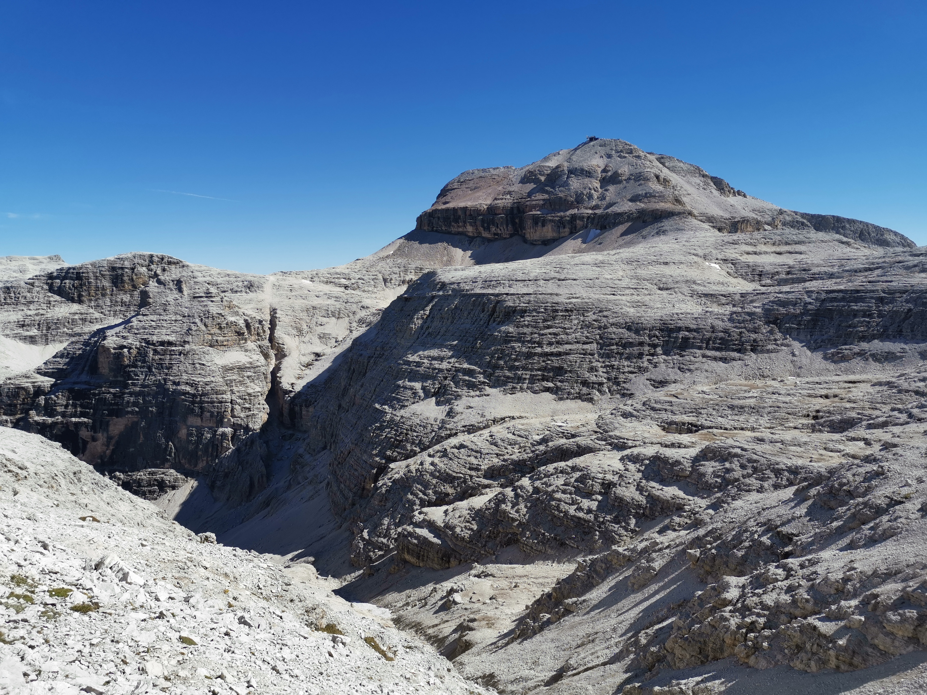 Piz Boe vom Sass Pordoi aus gesehen